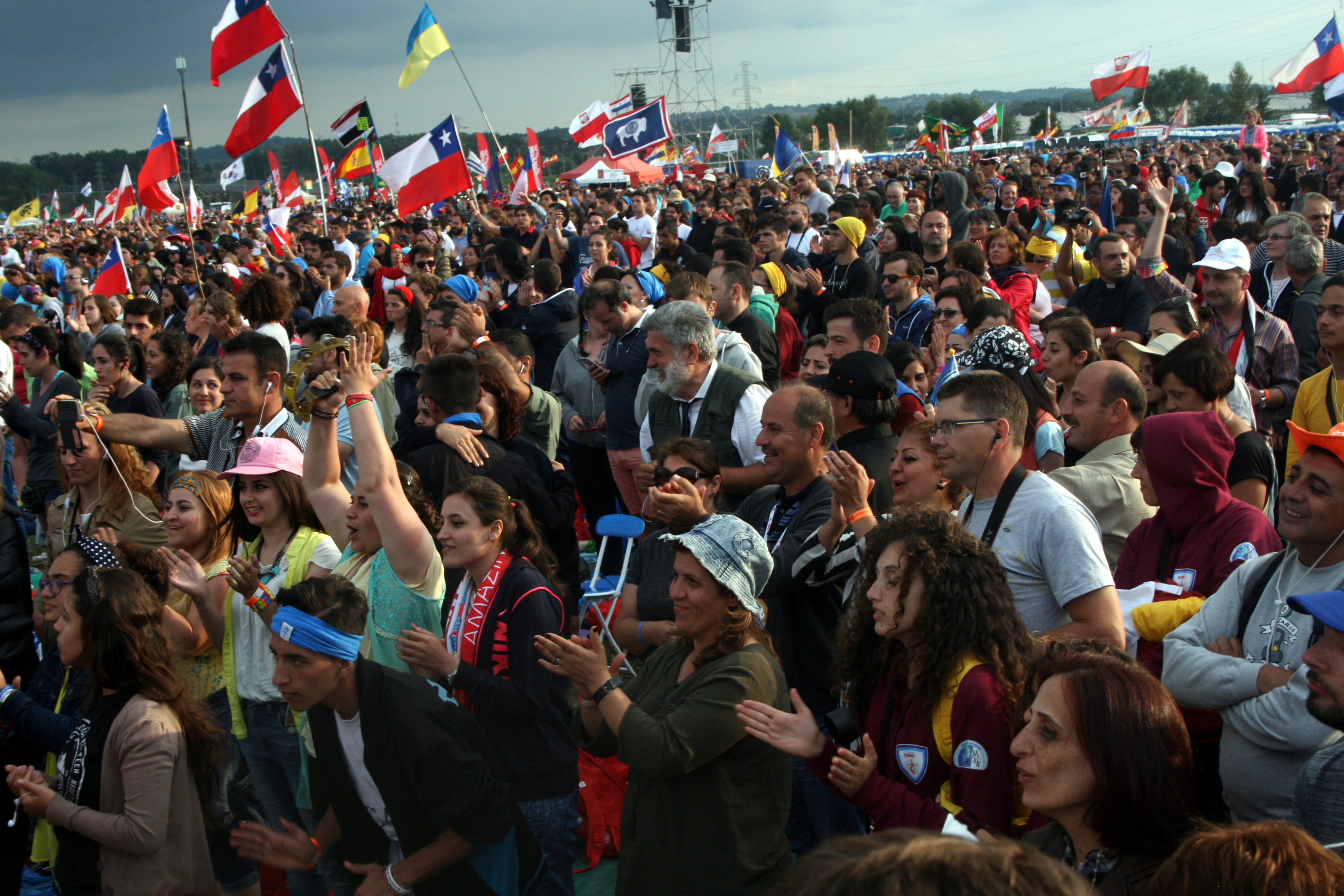 Spotkanie Powołaniowe Wspólnot neokatechumenalnych, Kraków 2016